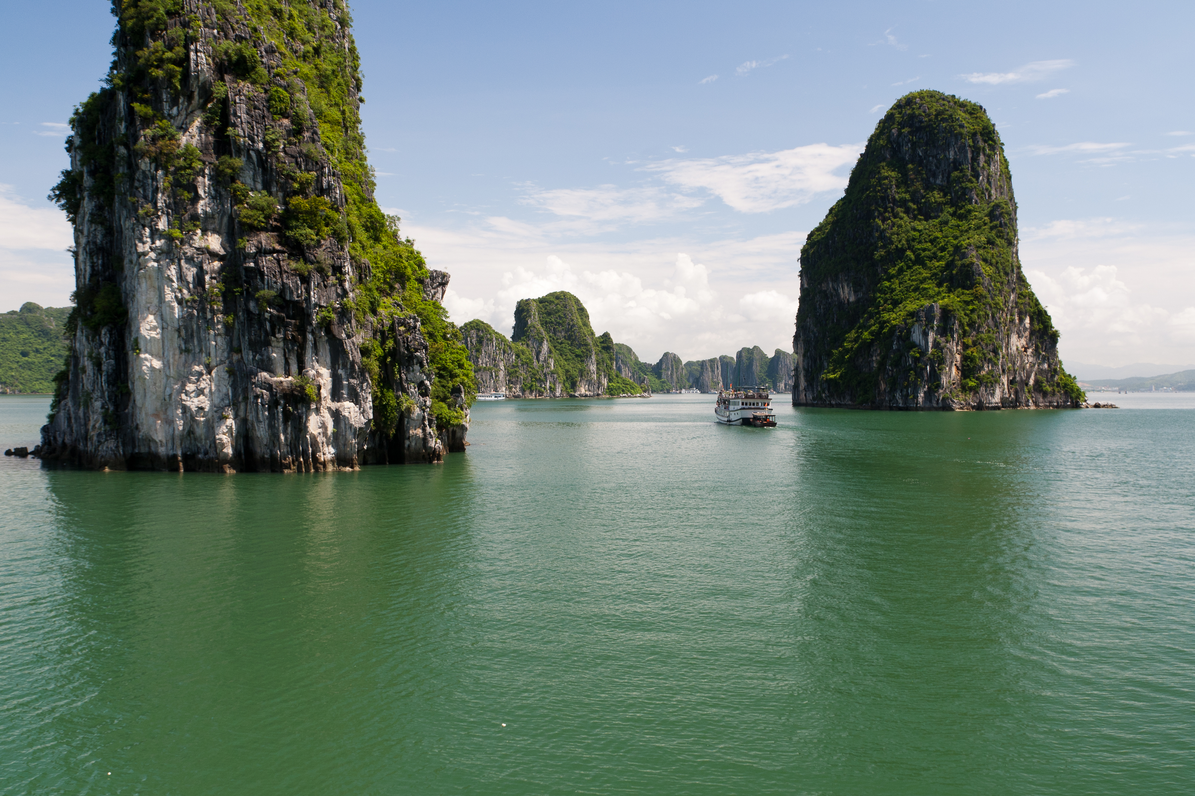 Ha Long Bay, Vietnam